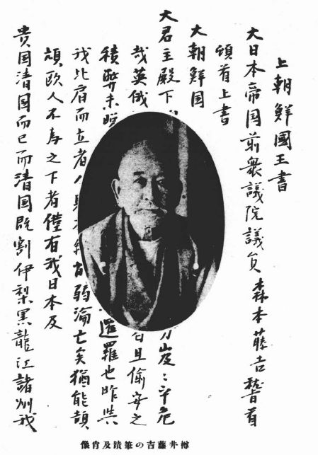 東洋社会党の創設者w:ja:樽井藤吉